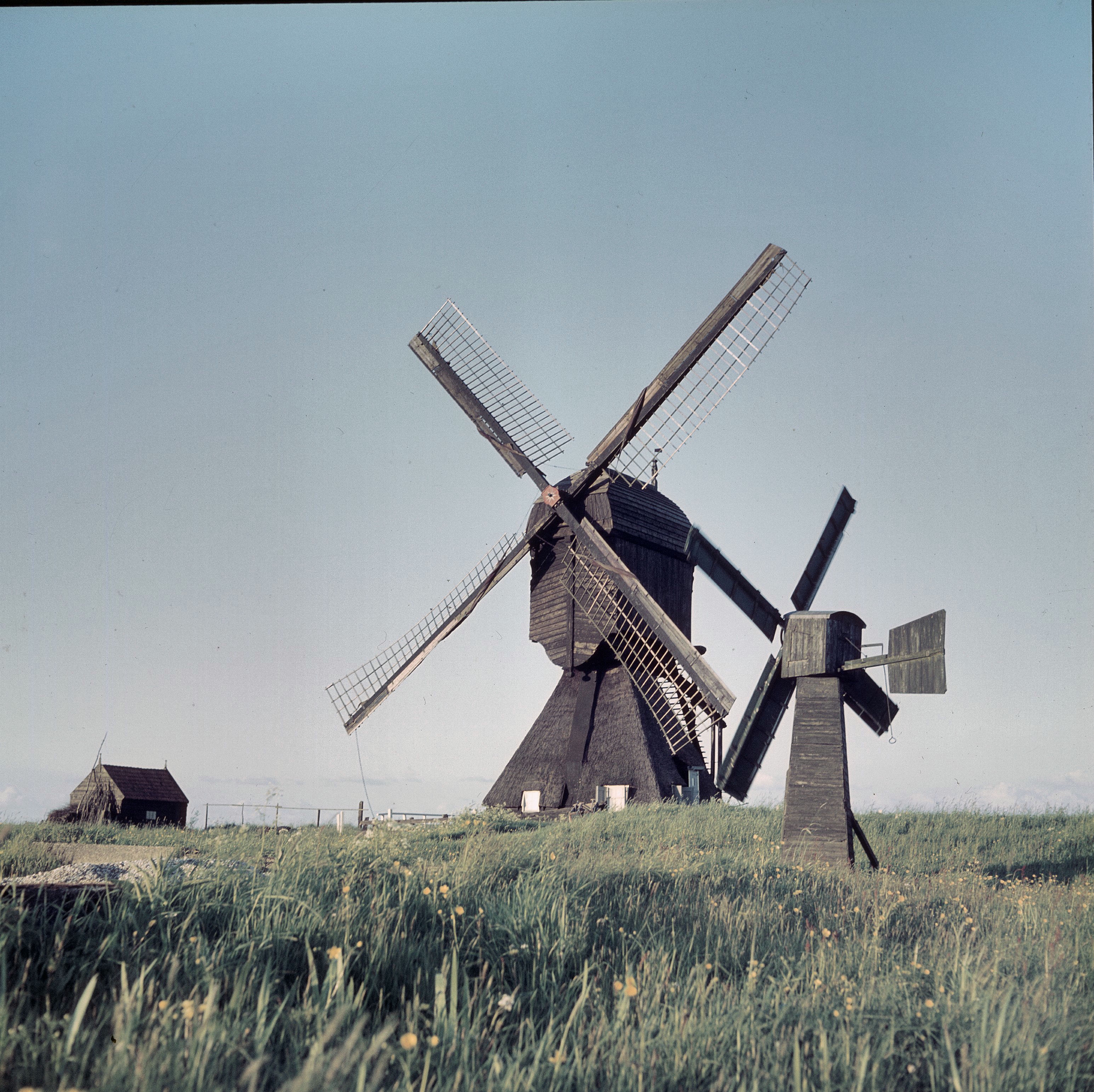 De Westermolen: Overzicht met op de voorgrond een weidemolen (opmerking: Diacollectie Molens)